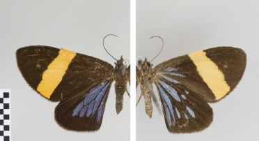 Hagnagora catagrammina